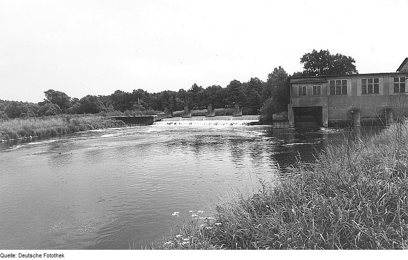 Original image description from the Deutsche Fotothek Rothenburg/O.L.-Nieder-Neundorf. Neißewehr an der Pappenfabrik